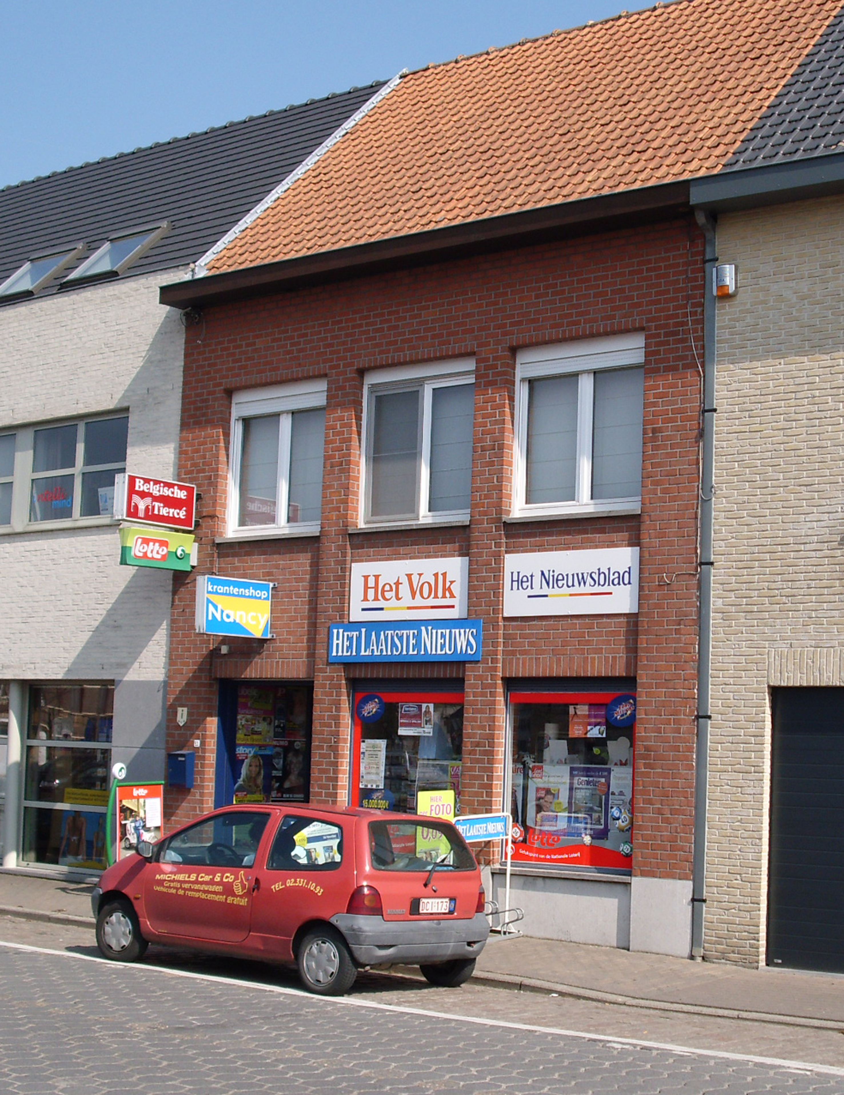 Krantenwinkel in Asper - Gavere - Oost-Vlaanderen - Vlaanderen - België